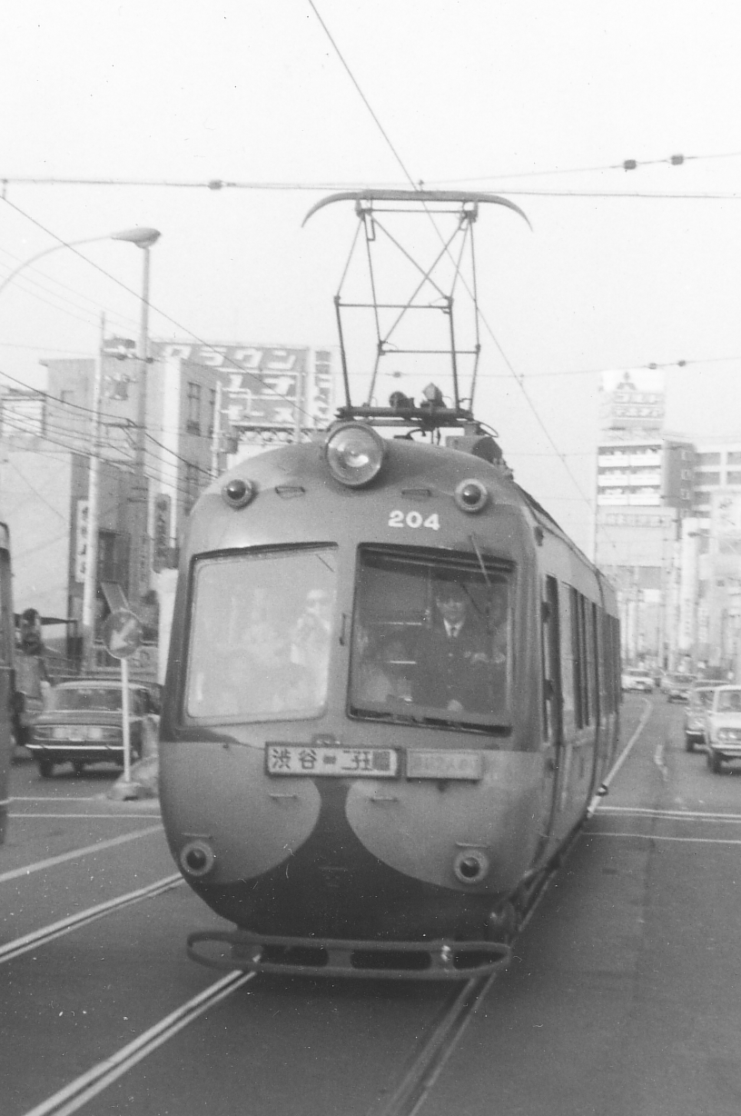 東急デハ200形204（真中駅）